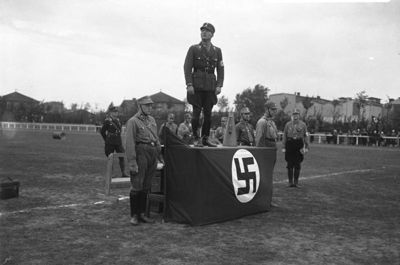 1932, Berlin-Köpenick: Oberführer Ernst spricht auf einem Sportfest